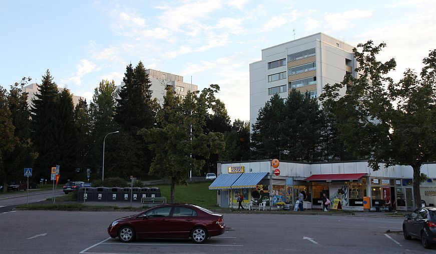 Vantaanpuiston ostoskeskusta Vantaalla. Taustalla Vantaanpuiston tornitaloja. Huom: Muista säilyttää viittaus kuvaajaan, mikäli käytät kuvaa.